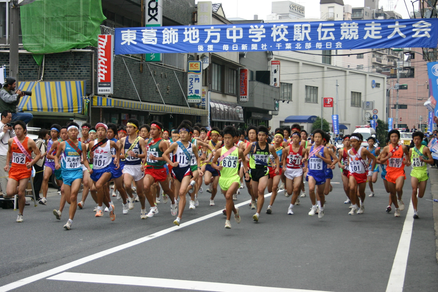 東葛駅伝スタートの様子(松戸市立中部小学校前で撮影)